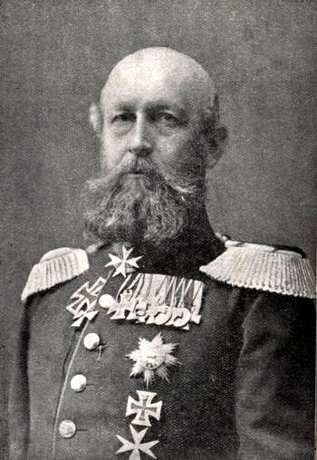 Friedrich Franz II. (Mecklenburg-Schwerin)